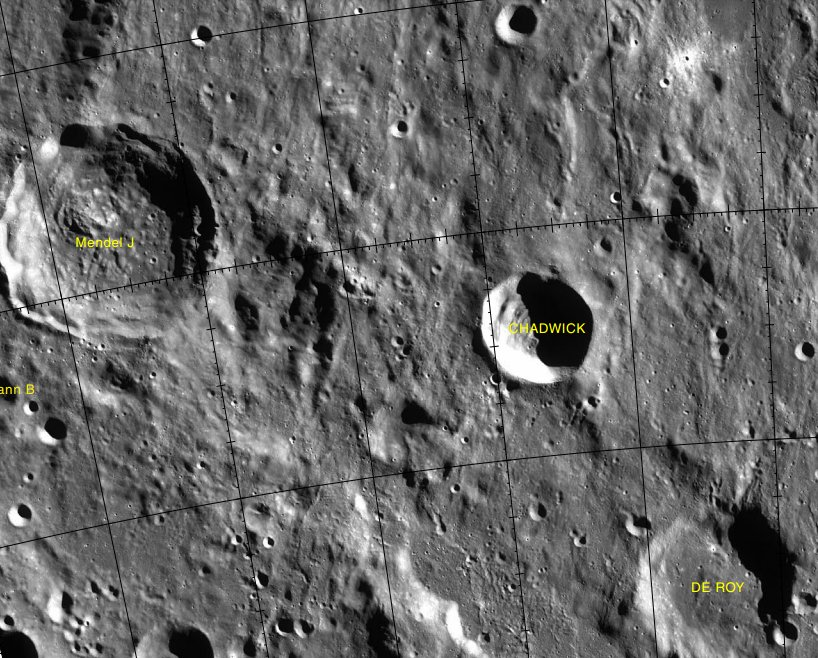 Cráter Chadwick (LROC). Localización